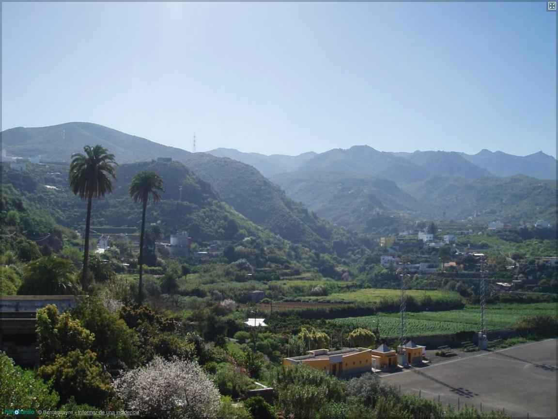 Paisaje de Lomo Magullo y Arenales